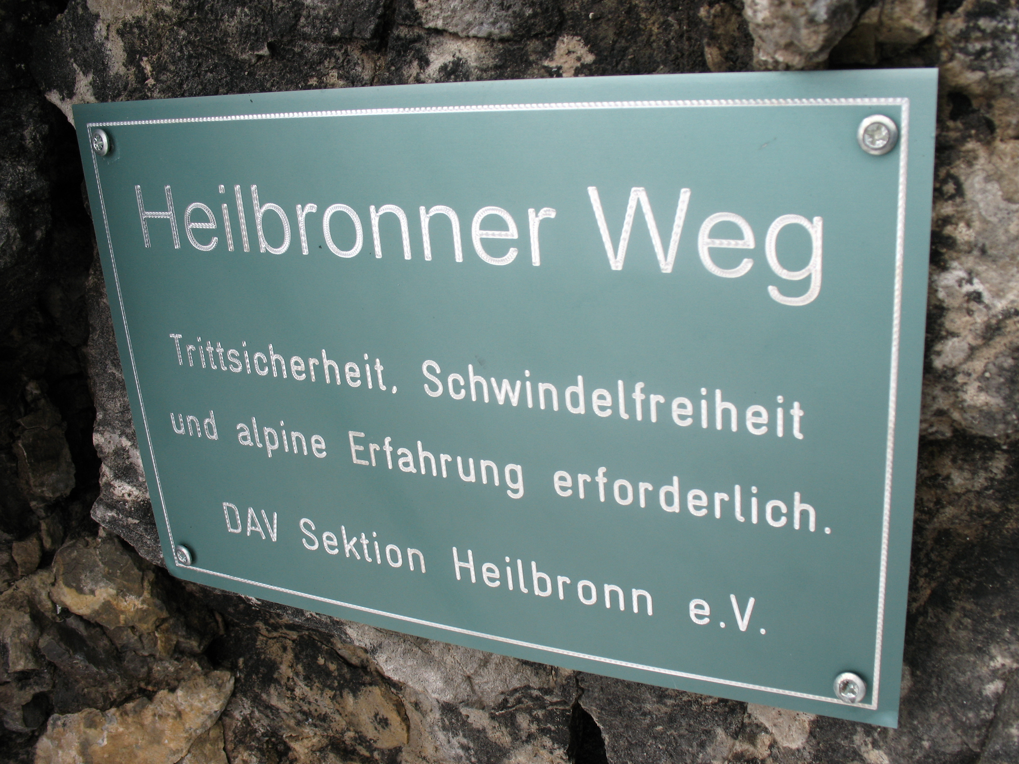 Hinweisschild am Beginn des Heilbronner Wegs in den Allgäuer Alpen.